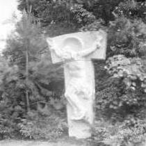 Bundesgartenschau 1957 in Köln